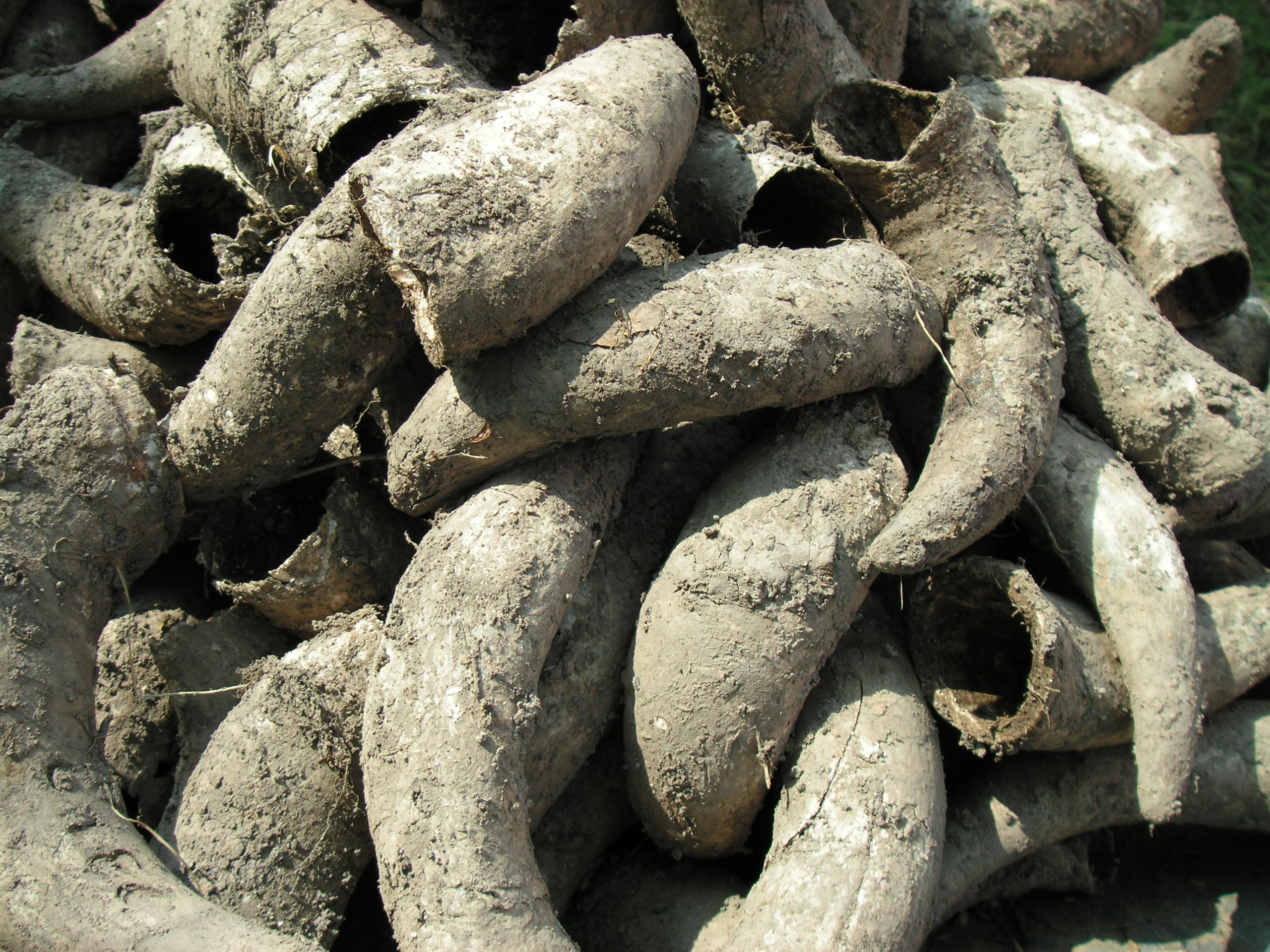 Cornes utilisées pour réaliser les préparations 500 et 501.